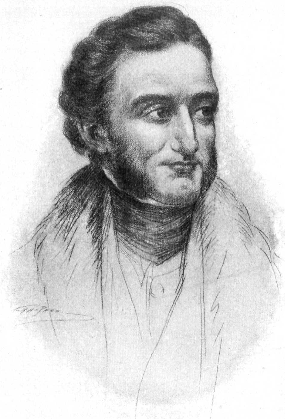 J. M. W. Turner